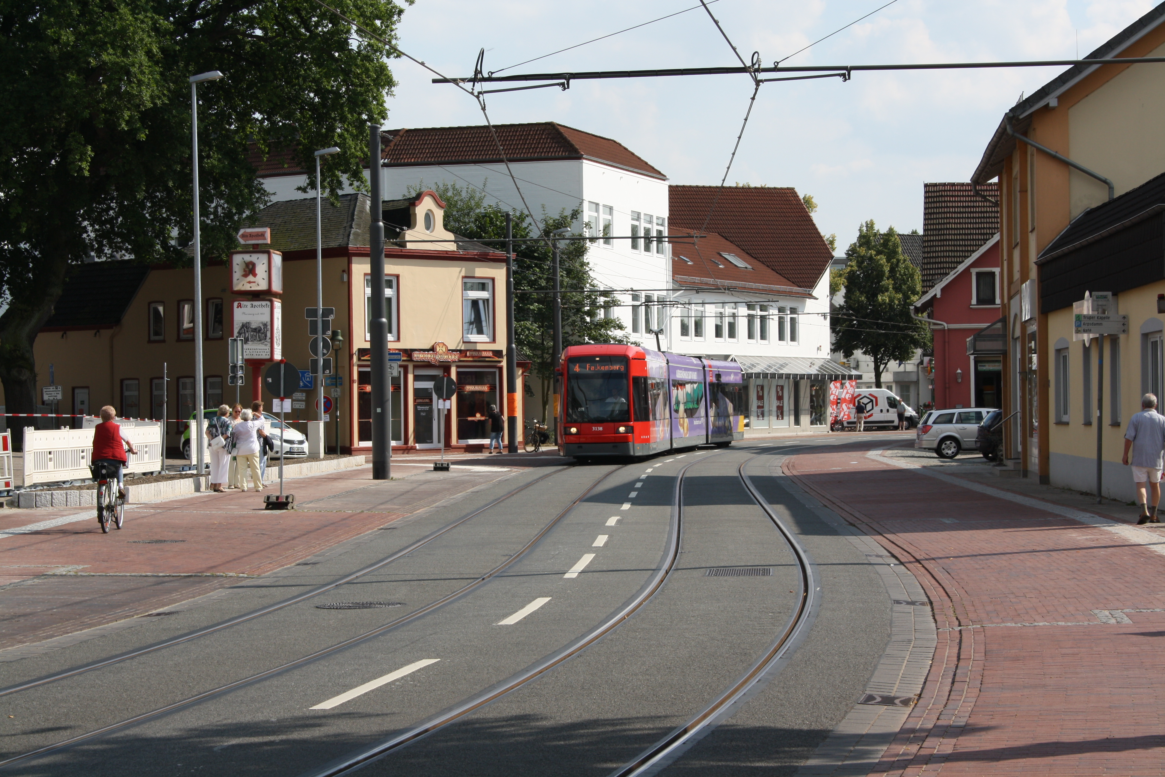 Die Erweiterung der Straßenbahn 4 nach Lilienthal-Falkenberg wurde am 1.8.2014 in Betrieb genommen. Eine der ersten Straßenbahnen Richtung Falkenberg Höhe Apothekenstraße